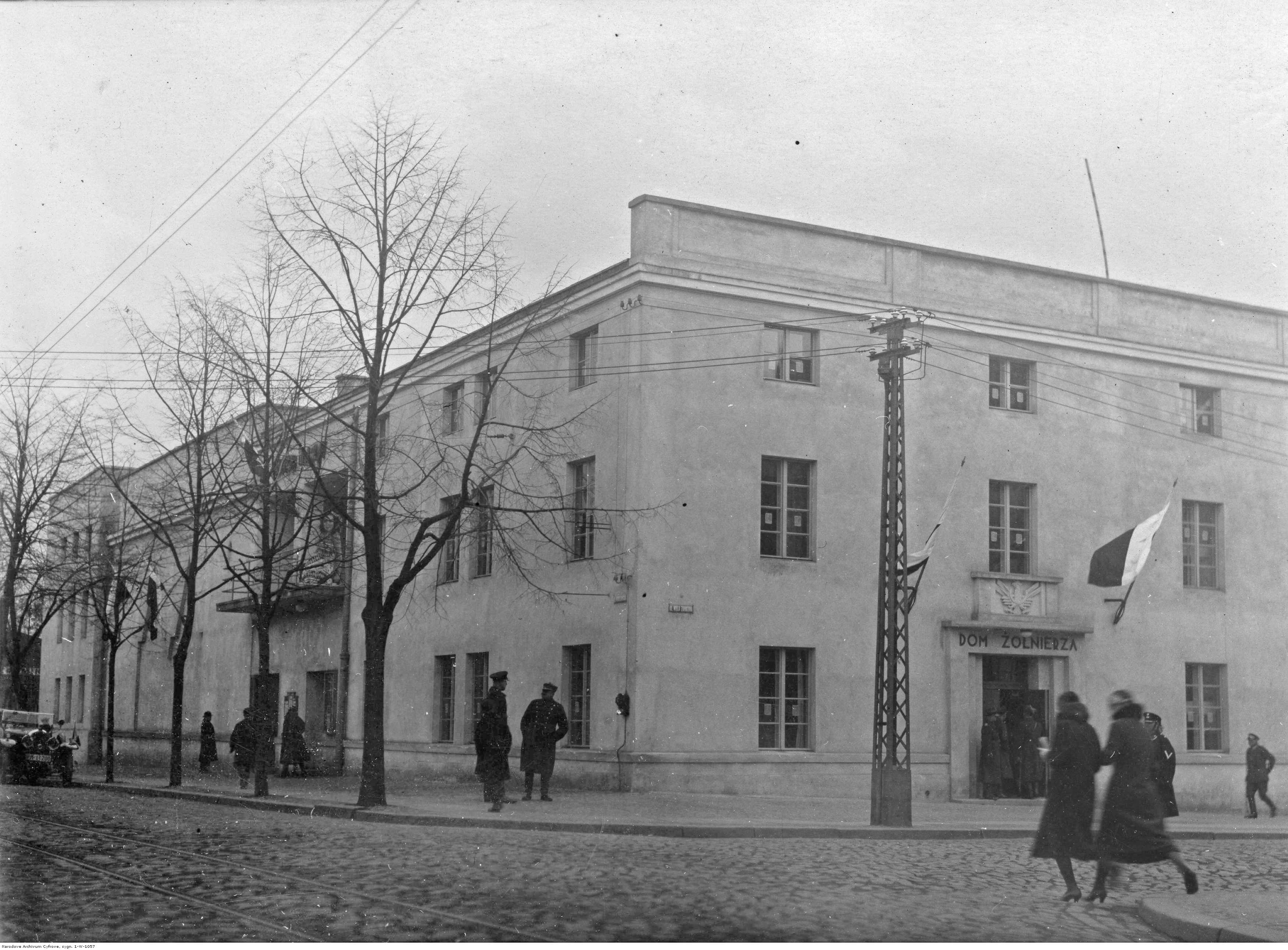 Dawny Dom Żołnierza Polskiego i kino "Mars" (później "Grunwald") przy ul. Warszawskiej 11 w Toruniu. Obecnie w trakcie adaptacji na teatr muzyczny. Zdjęcie z marca 1933 r. ze zbiorów Narodowego Archiwum Cyfrowego